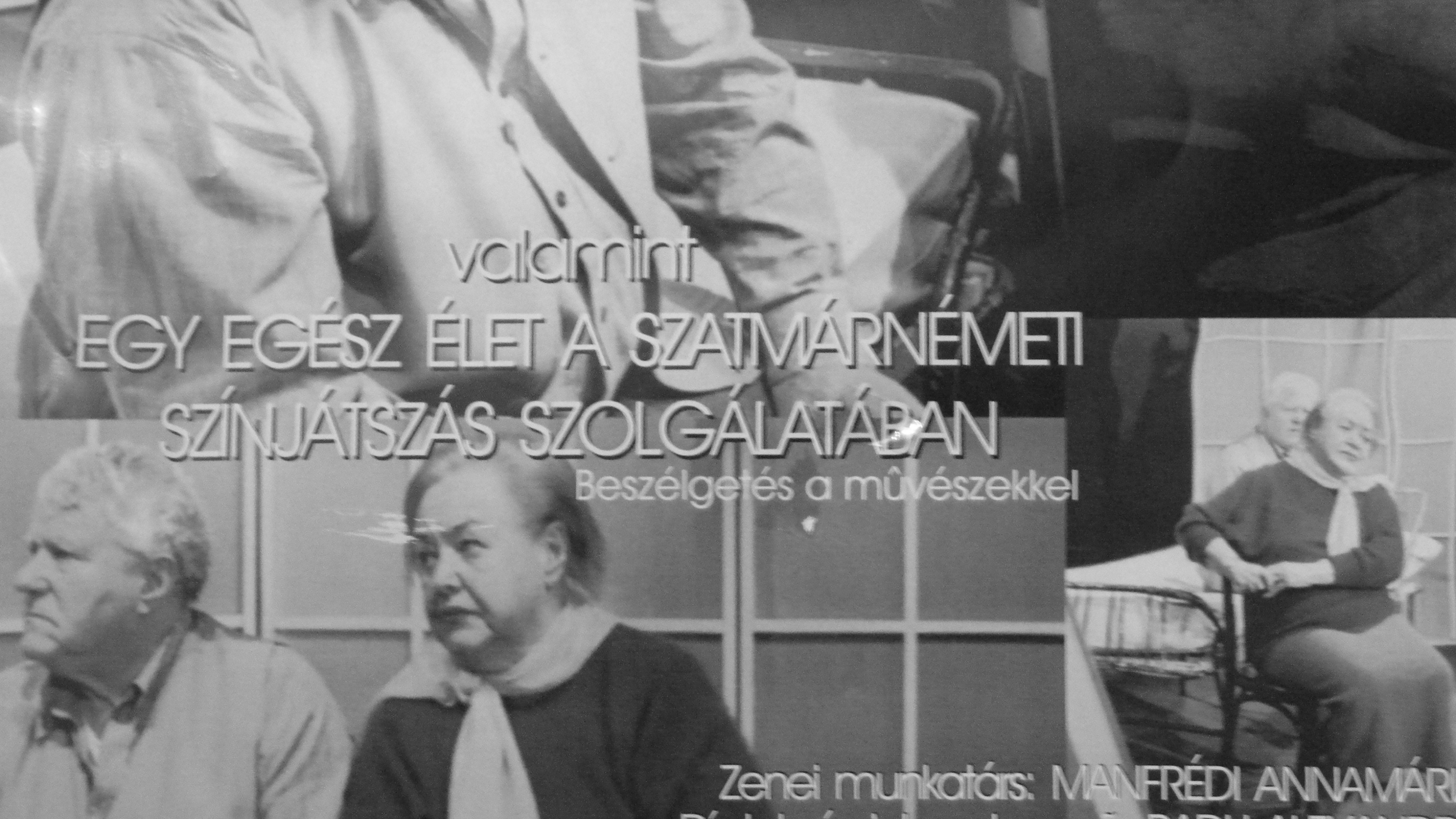 Plakátrészlet